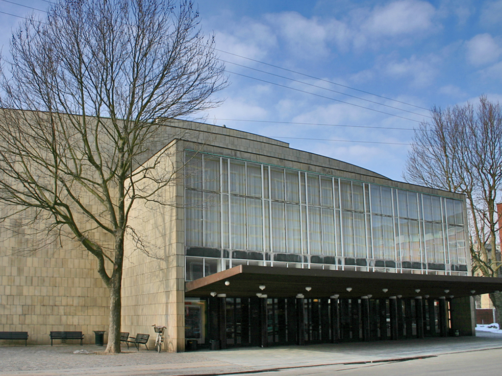 Radiohuset Koncertsal, Hovedindgangen på Julius Thomsens Gade.